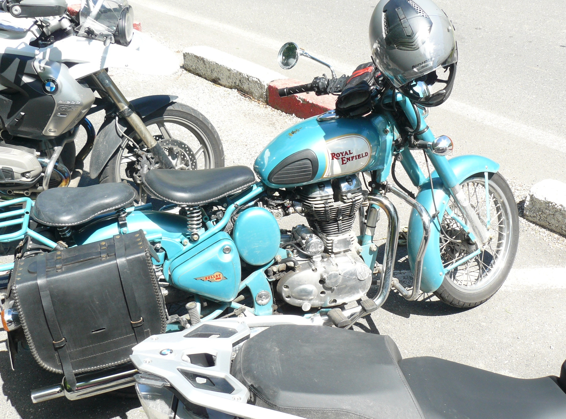 Royal Enfield motocykl angielski